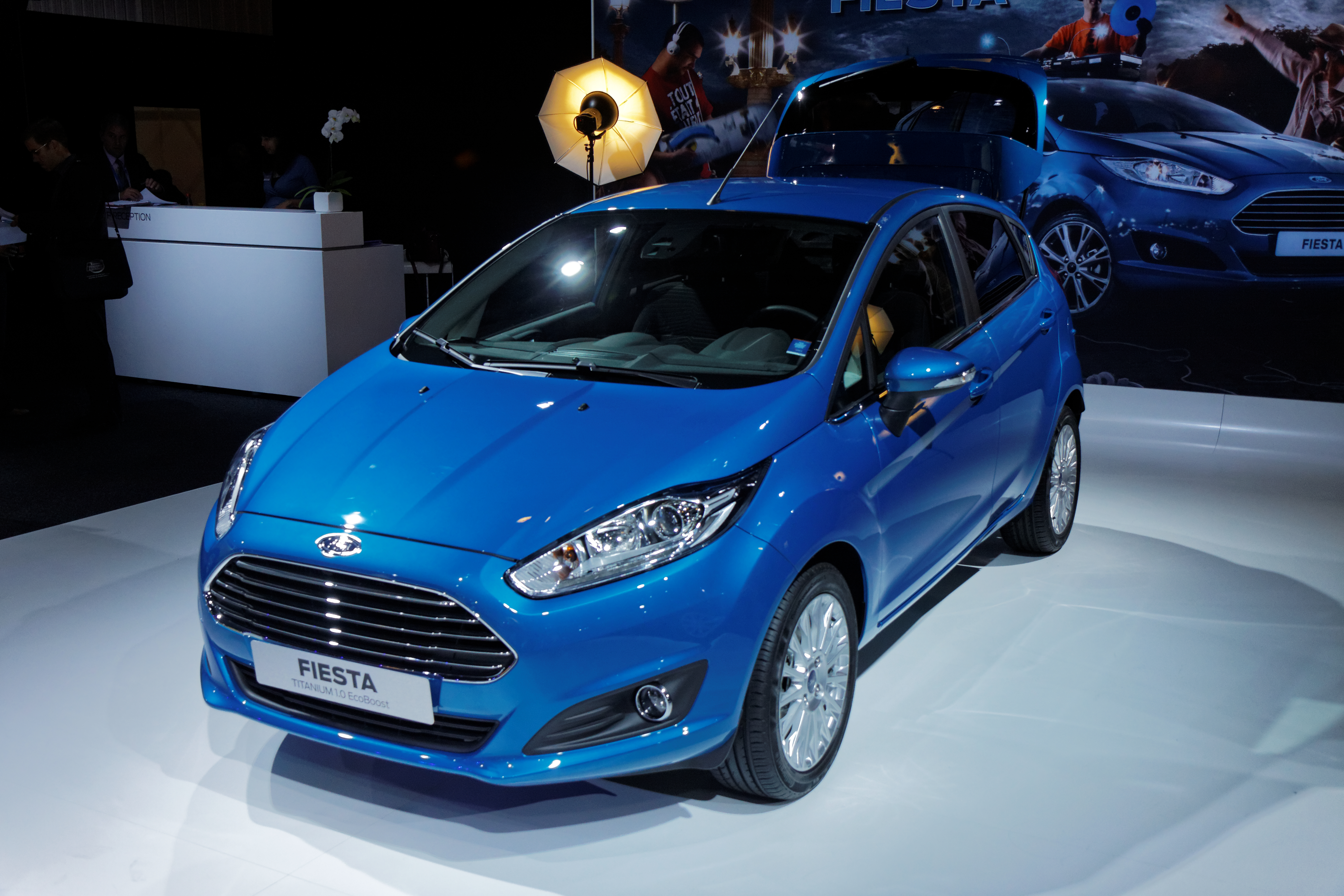 La Ford Fiesta présentée lors du Mondial de l'Automobile de Paris 2012.